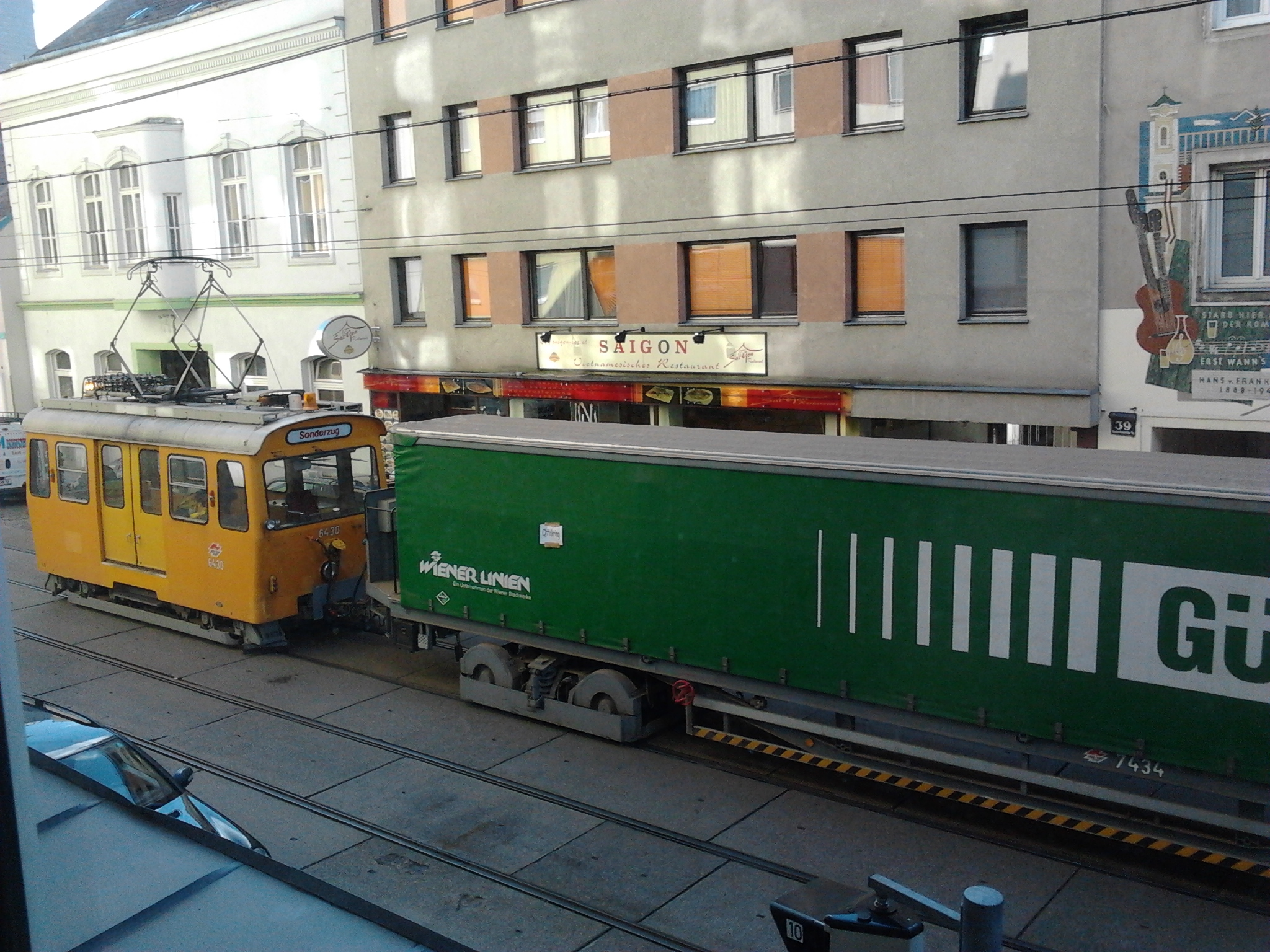 Eine Güterbim der Wiener Linien unterwegs in der Neulerchenfelderstraße, Wien.